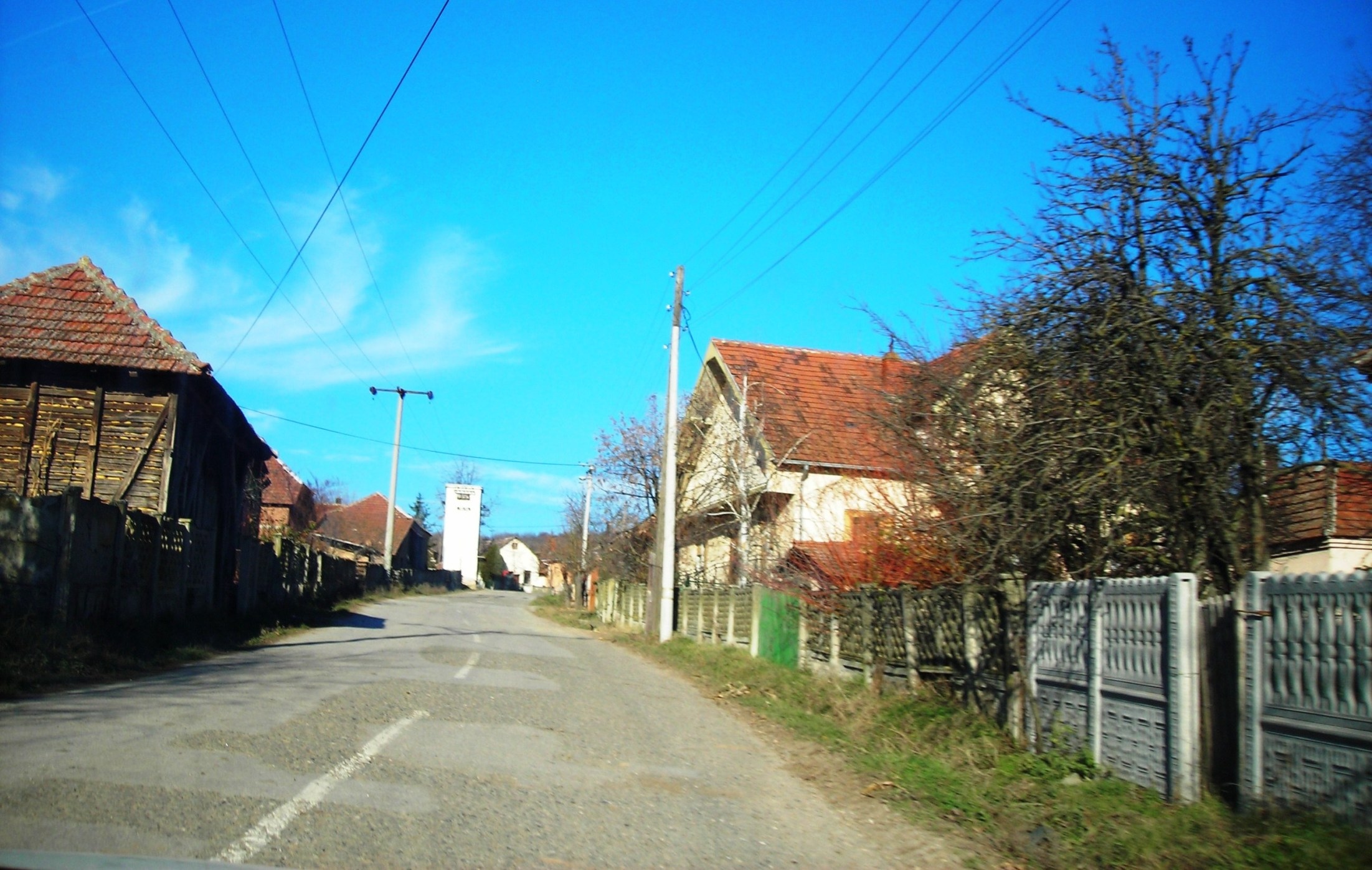 Улица у Подгорцу - a Street in Podgorac